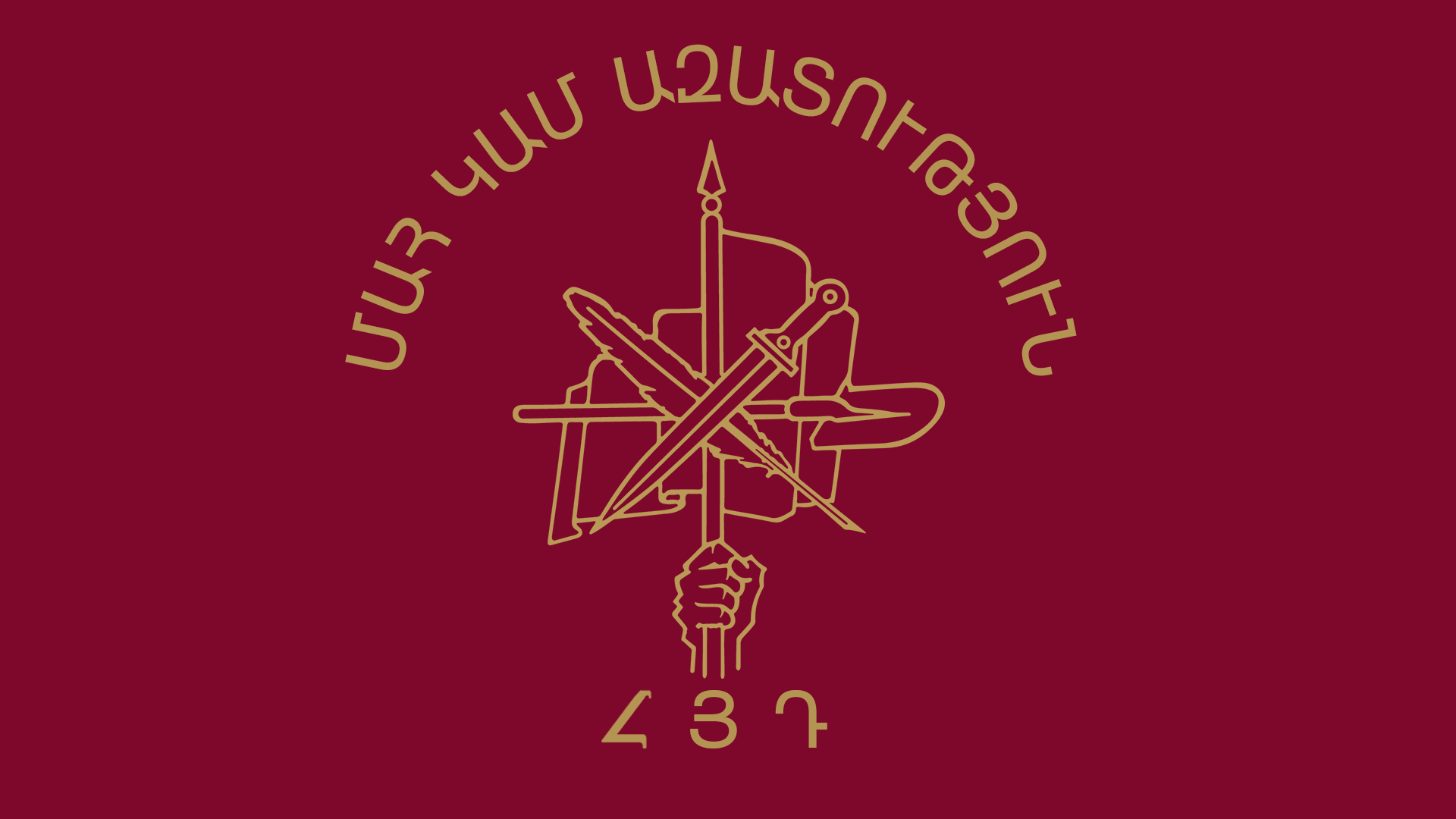 Հայ ֆիդայական շարժման դրոշ (ՀՅԴ)